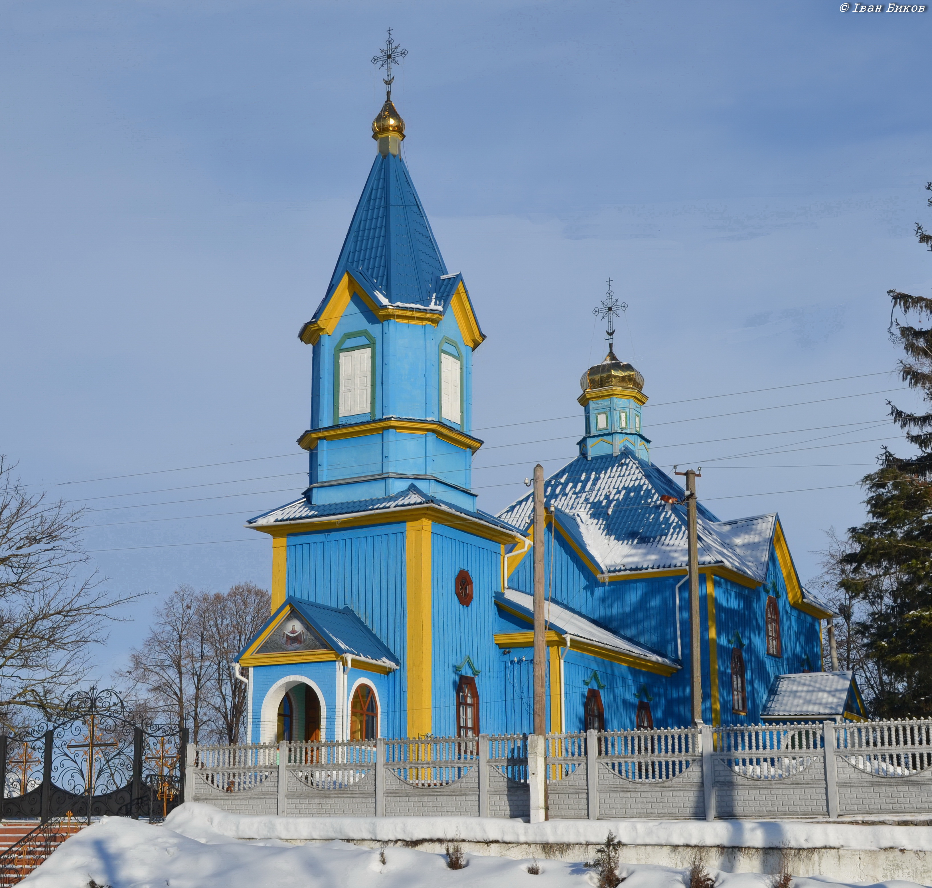 Покровська церква, село Мотовилівка